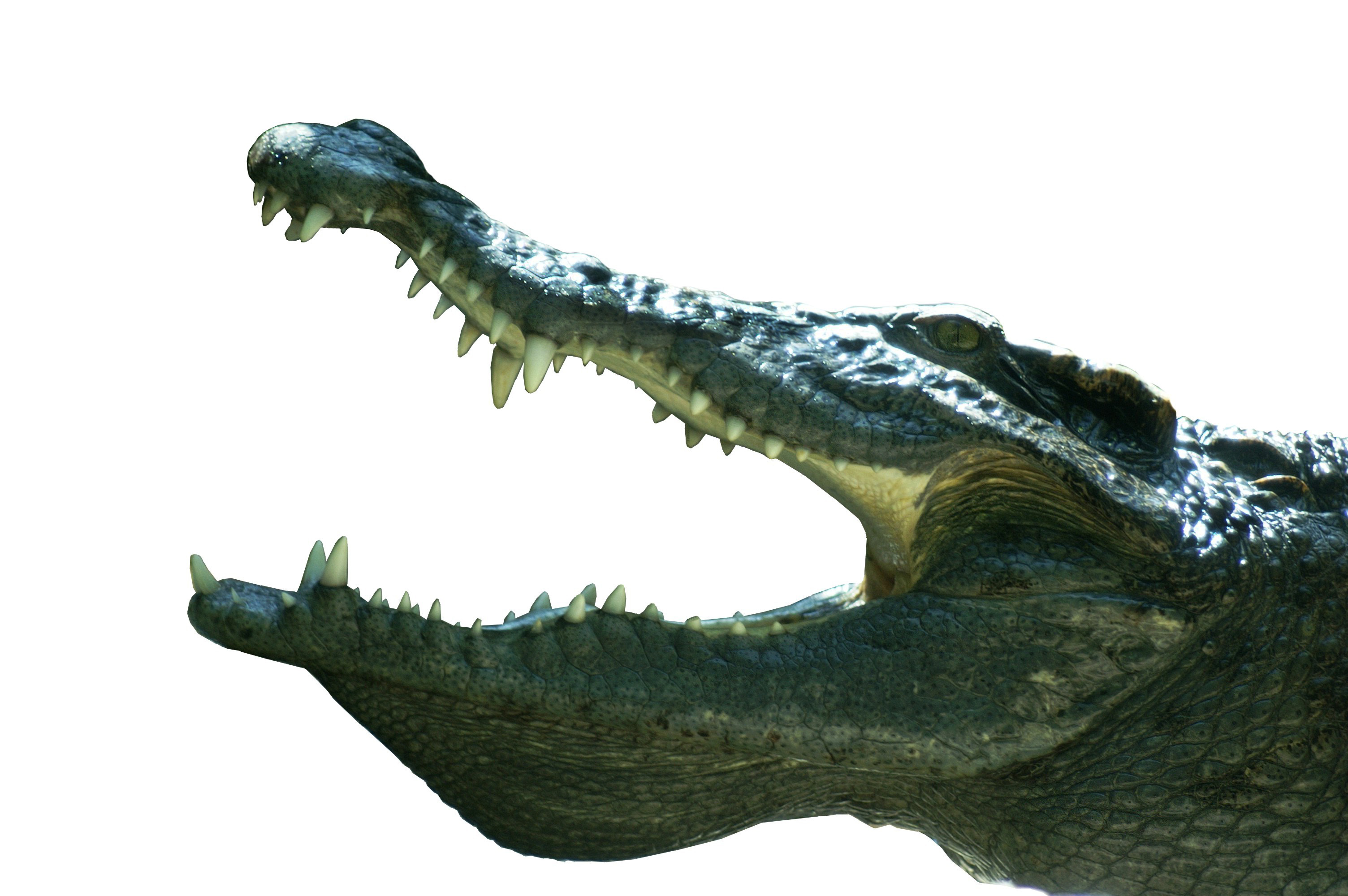 Freistellung (Fotografie) eines Krokodil Kopfes. Die Ordnung der Krokodile umfasst zusammen mit den Vögeln die letzten Überlebenden der Archosaurier, zu denen außer diesen noch die ausgestorbenen Pterosaurier und Dinosaurier gehörten.